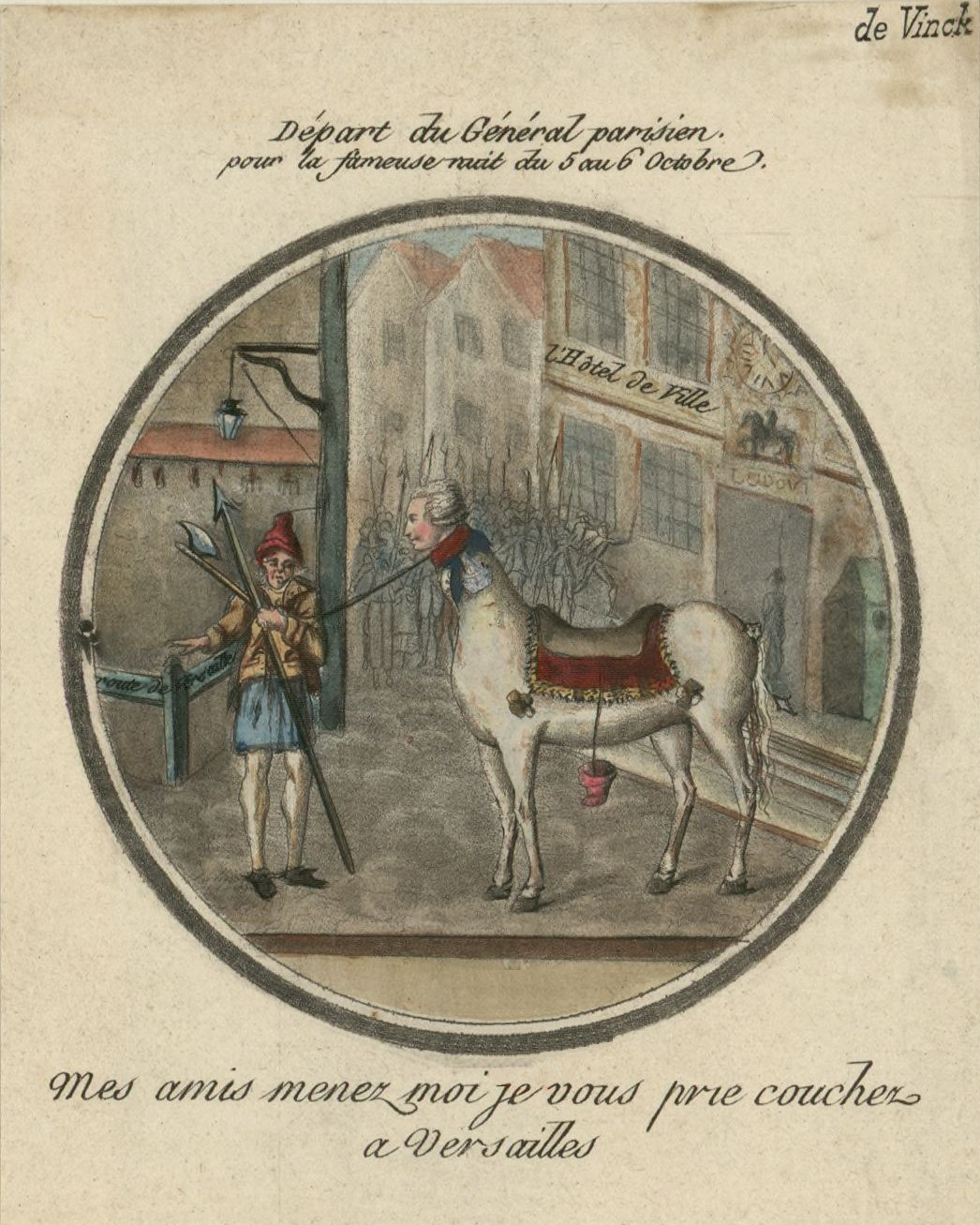 Caricature moquant le rôle de La fayette lors des journées d'octobre 1789